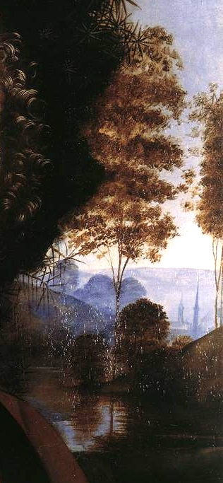 Landscape in Ginevra de Benci's portrait